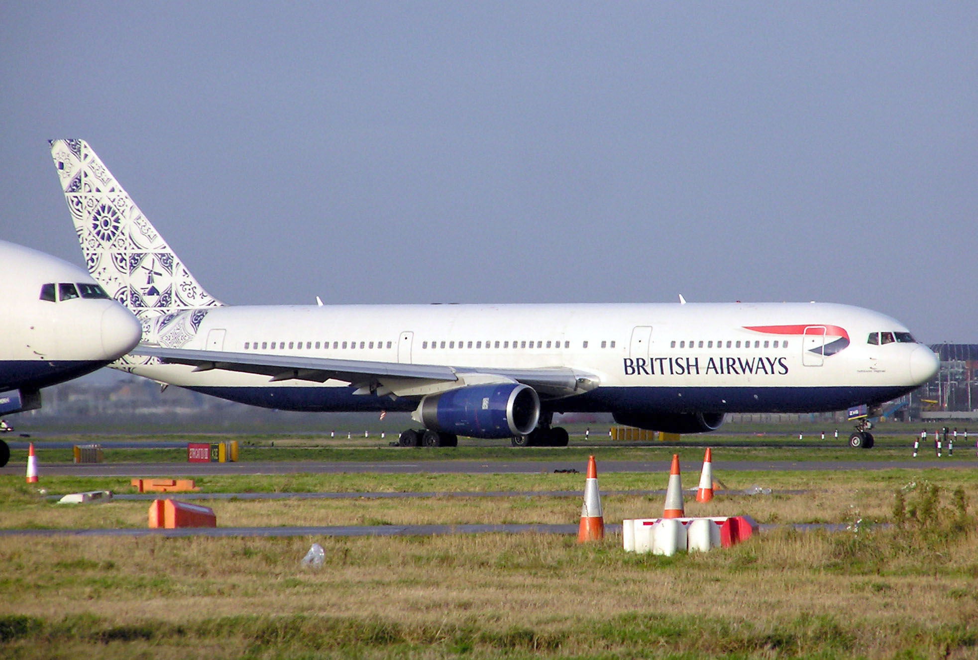 Aviones de British Airways en tierra British Airways Boeing 767-300 (G-BZHB), in Delft Blue Daybreak ethnic fin, taxiing for take off at London Heathrow Airport, England. Photographed by Adrian Pingstone in January 2005 and released to the public domain.